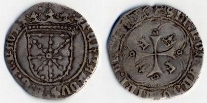 Real de Plata de Fernando I de Navarra